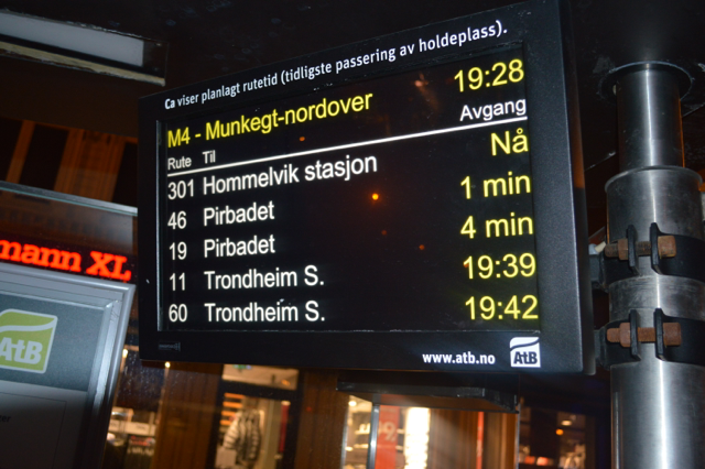 Sanntid vist på skjerm i Munkegata, Trondheim